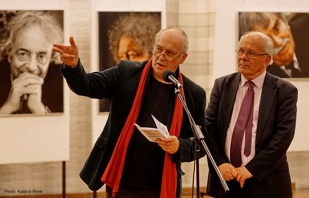 Eifert János és Bahget Iskander fotóművészek utóbbi Íróbarátaim címmel megnyított fotókiállításán